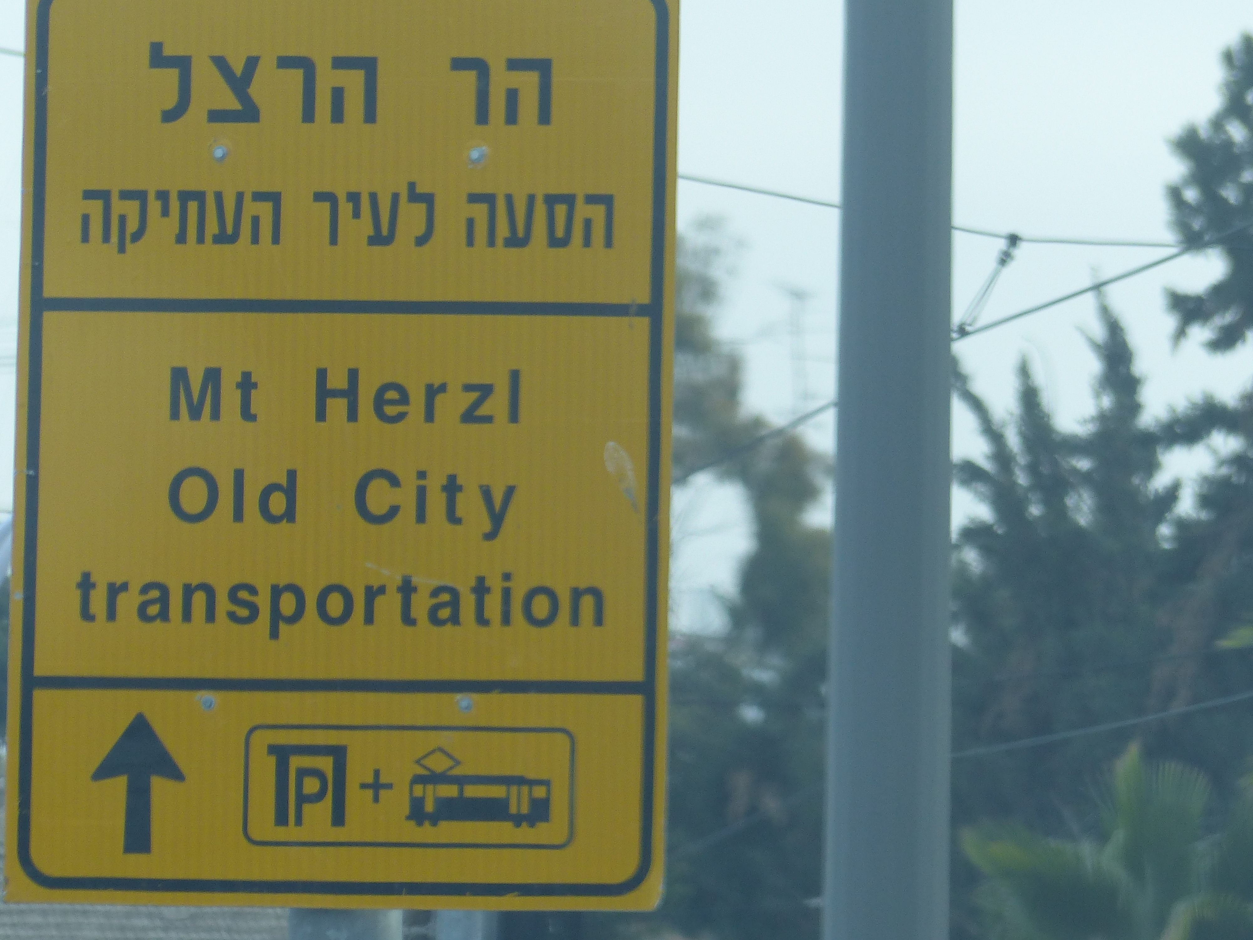 Tramway de Jérusalem : signalisation du parking relais de Mont Hertzl